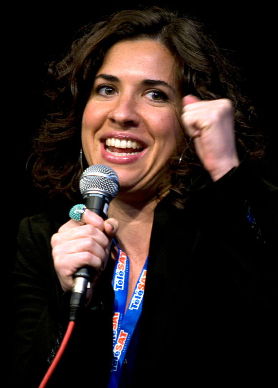 Jac Schaeffer